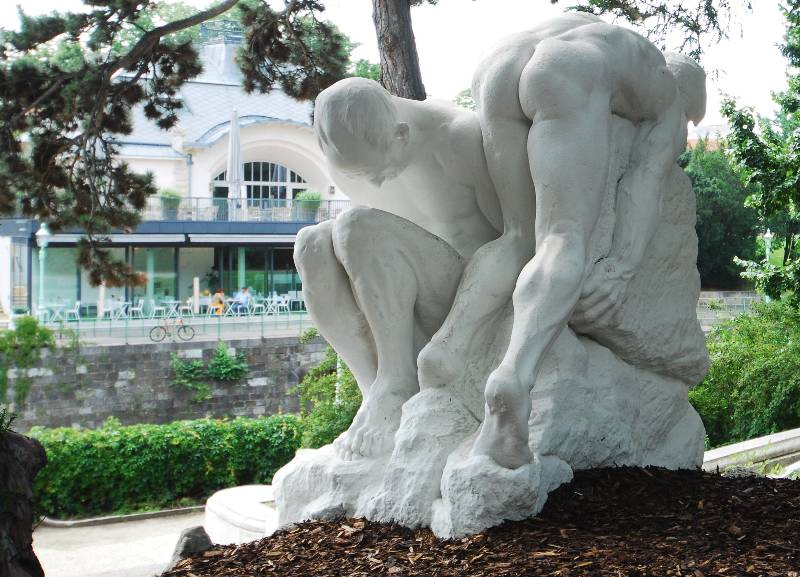 "Befreiung der Quelle-Brunnen" im Wiener Stadtpark (1. Wiener Gemeindebezirk). Im Hintergrund die ehemalige Meierei.